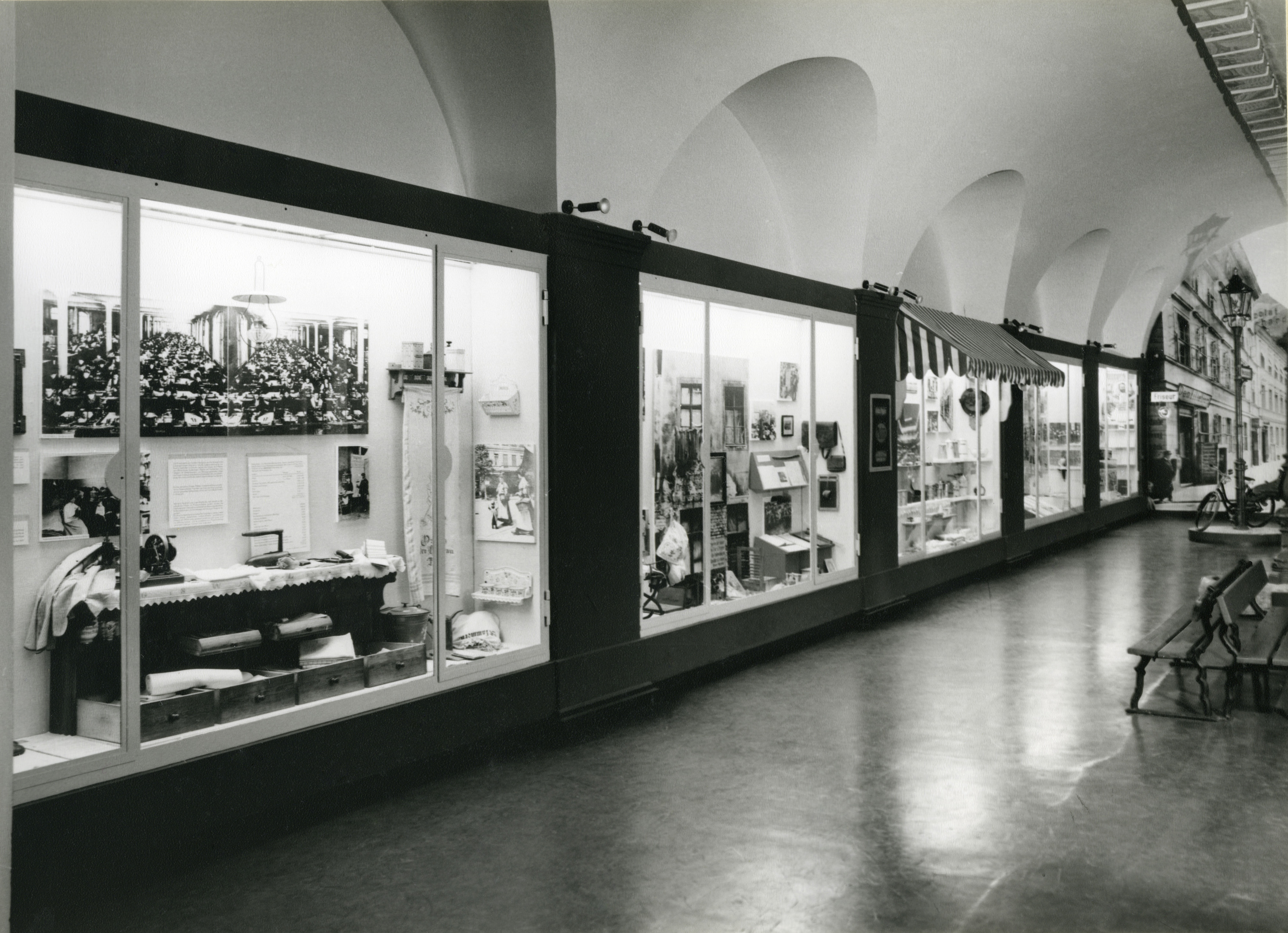 Ansicht aus der Ausstellung "Großstadtproletariat", die vom Museum für Volkskunde im Pergamonmuseum ab 1980 gezeigt wurde. GLAM-on-Tour: Wiki goes MEK! 2.0 Wikipedianer fotografierten vom 16. bis 18. November 2018 im Museum Europäischer Kulturen. This photo was taken during a project supported by WMDE. Gefördert von / Supported by: Wikimedia Deutschland, Museum Europäischer Kulturen